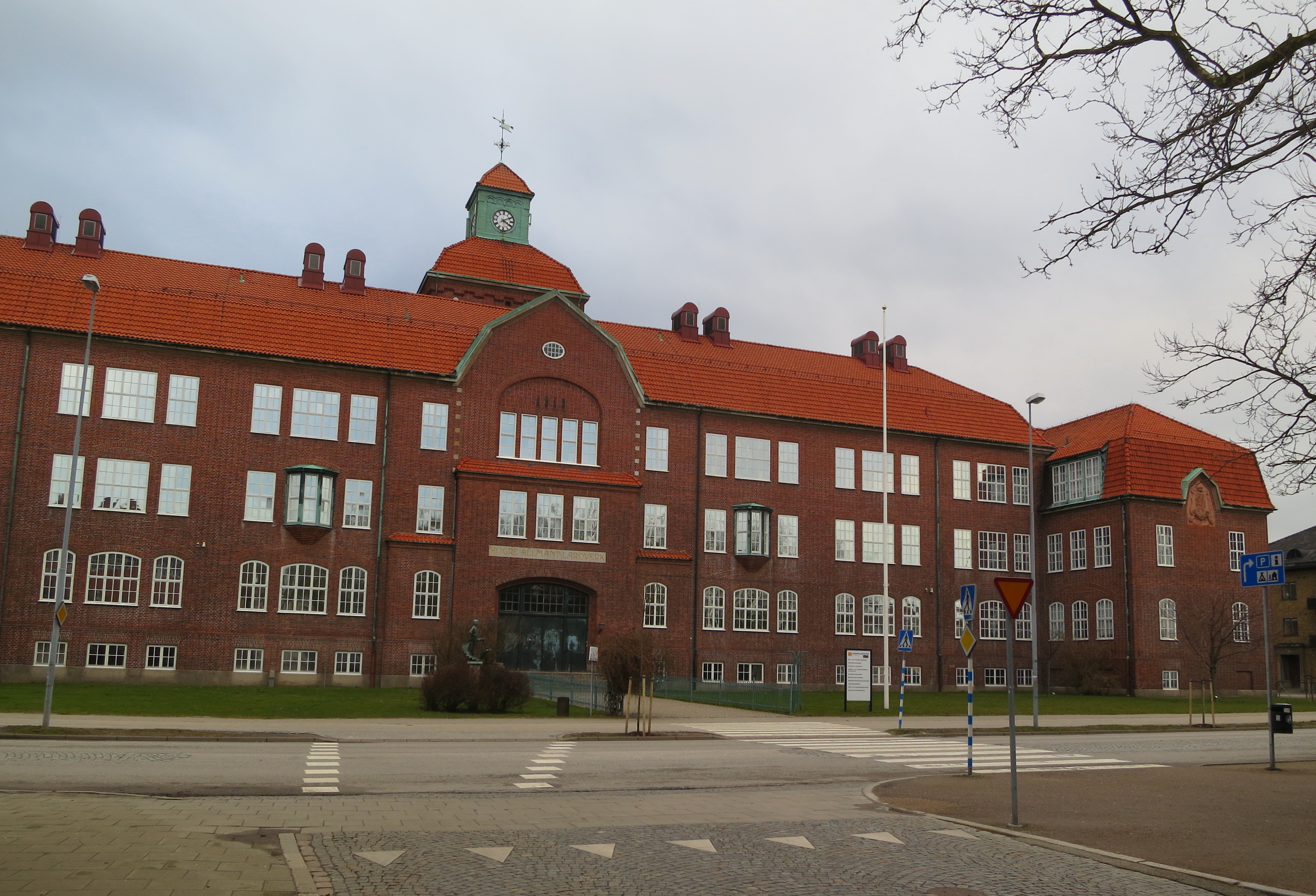 Österportsgymnasiet i Ystad